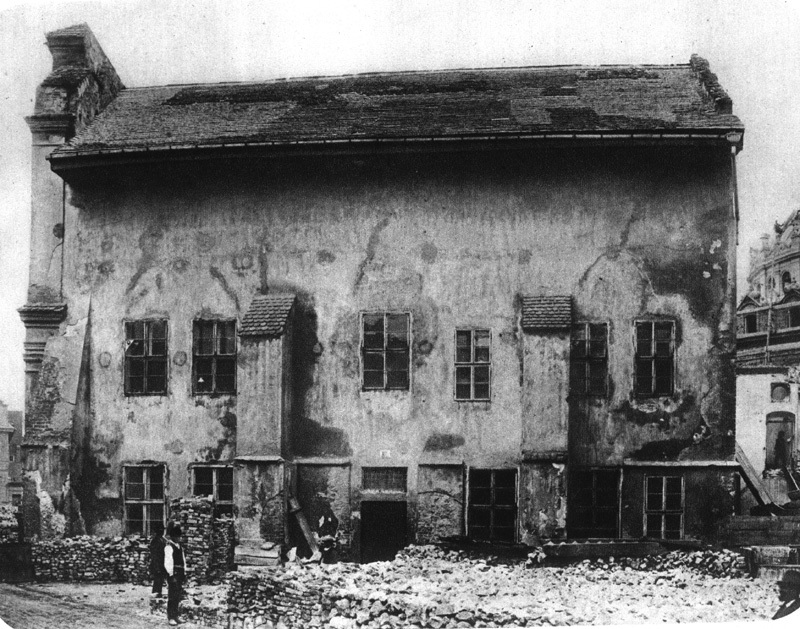 Plac św. Ducha. Nieistniejący kościół św. Ducha. Po prawej widoczny fragment budowanego teatru